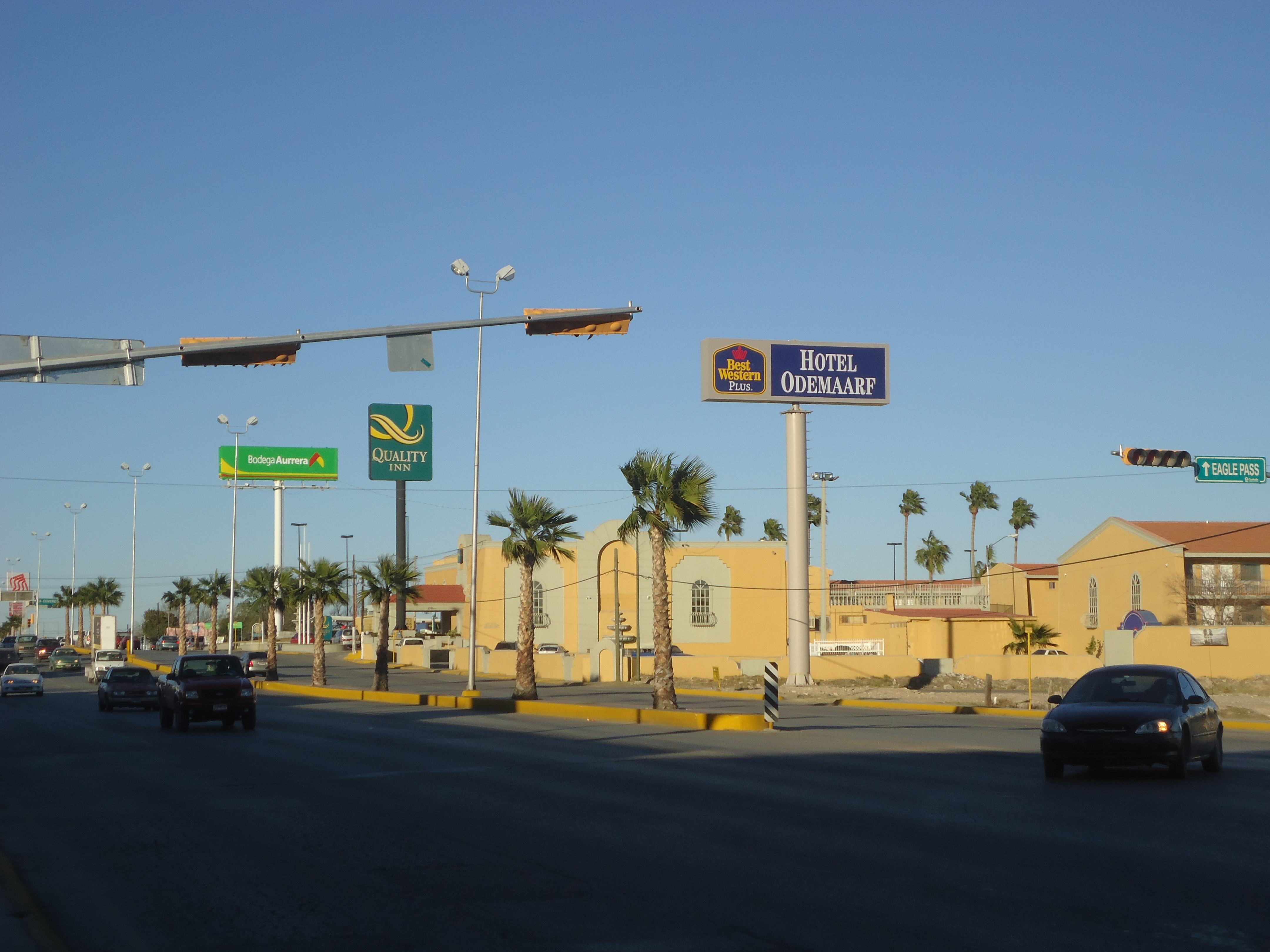 Zona hotelera y comercial sobre la avenida Lázaro Cárdenas, una de los más dinámicas (económicamente) de la ciudad.